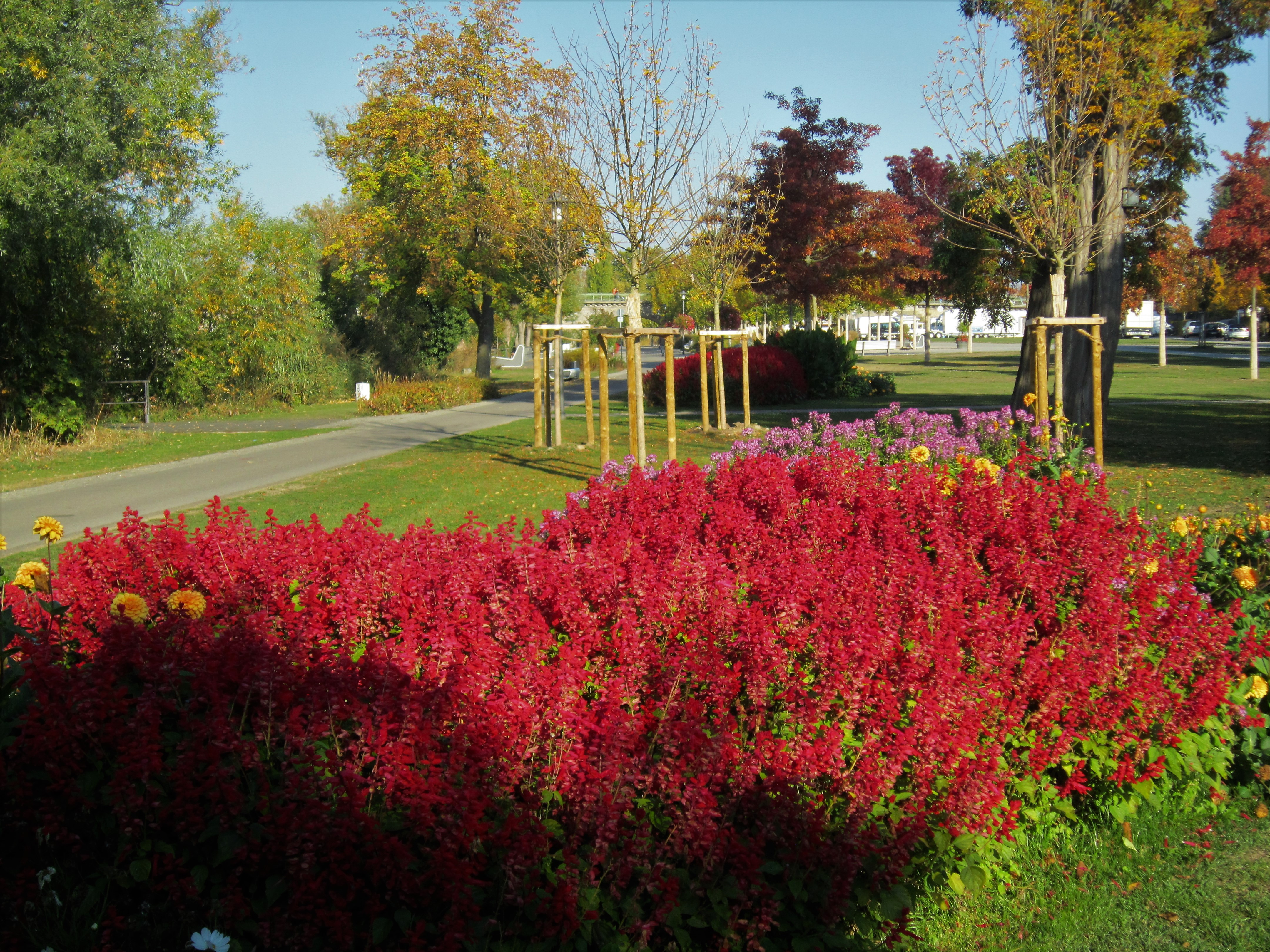 Park am Main in Kitzingen (ehemaliges Gelände der Bayerischen Kleinen Landesgartenschau 2011)